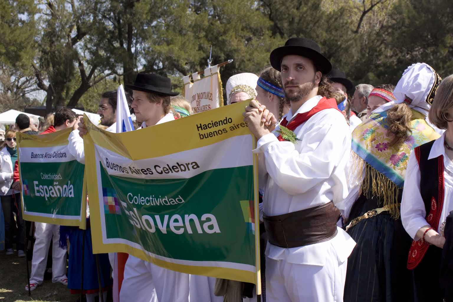 Dia del inmigrante 031